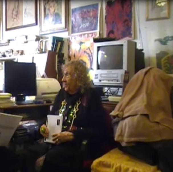 Duccia Camiciotti nella sua casa studio di Scandicci